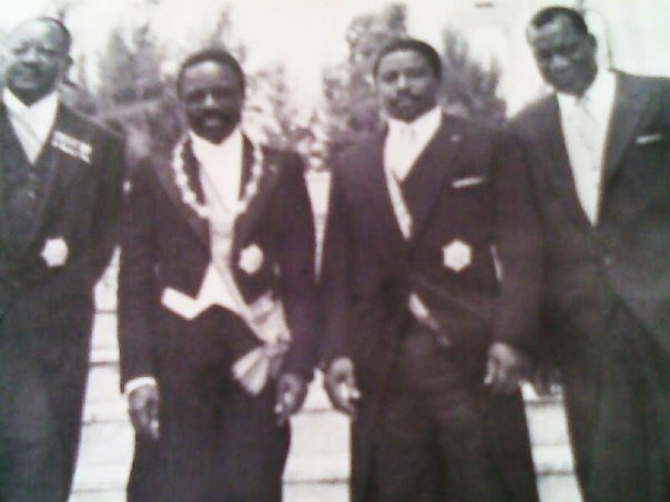 De Gauche à droite: Paul Gondjoult Président de la cour suprême, Omar Bongo Ondimba Président de la République, Léon Mébiame Premier ministre, Jean Jacques Boucavel Président du Conseil Économique et Social